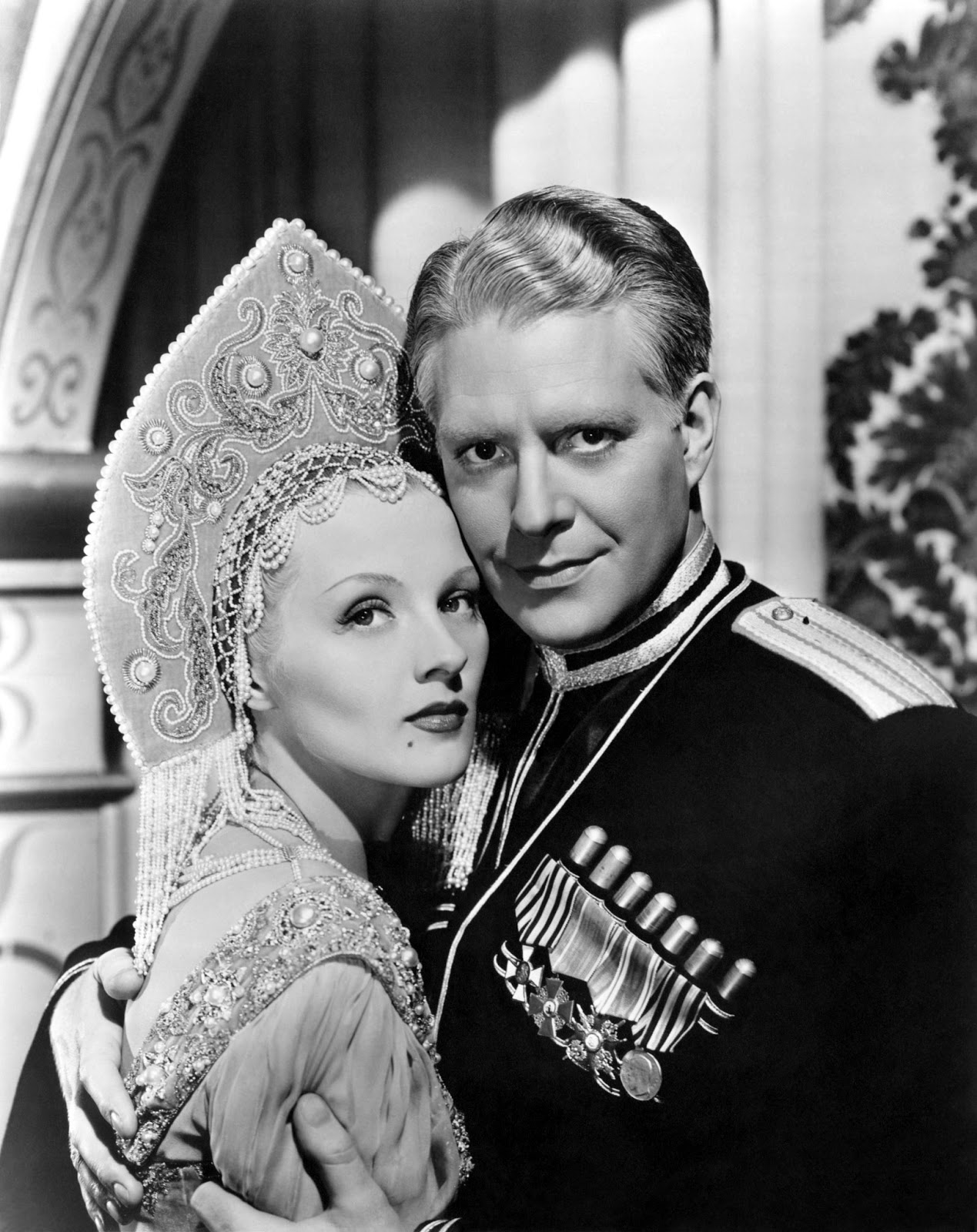 Hajmássy Ilona és Nelson Eddy a "Balalajka" című filmben. Hungarian postcard by Athenaeum Color[1]